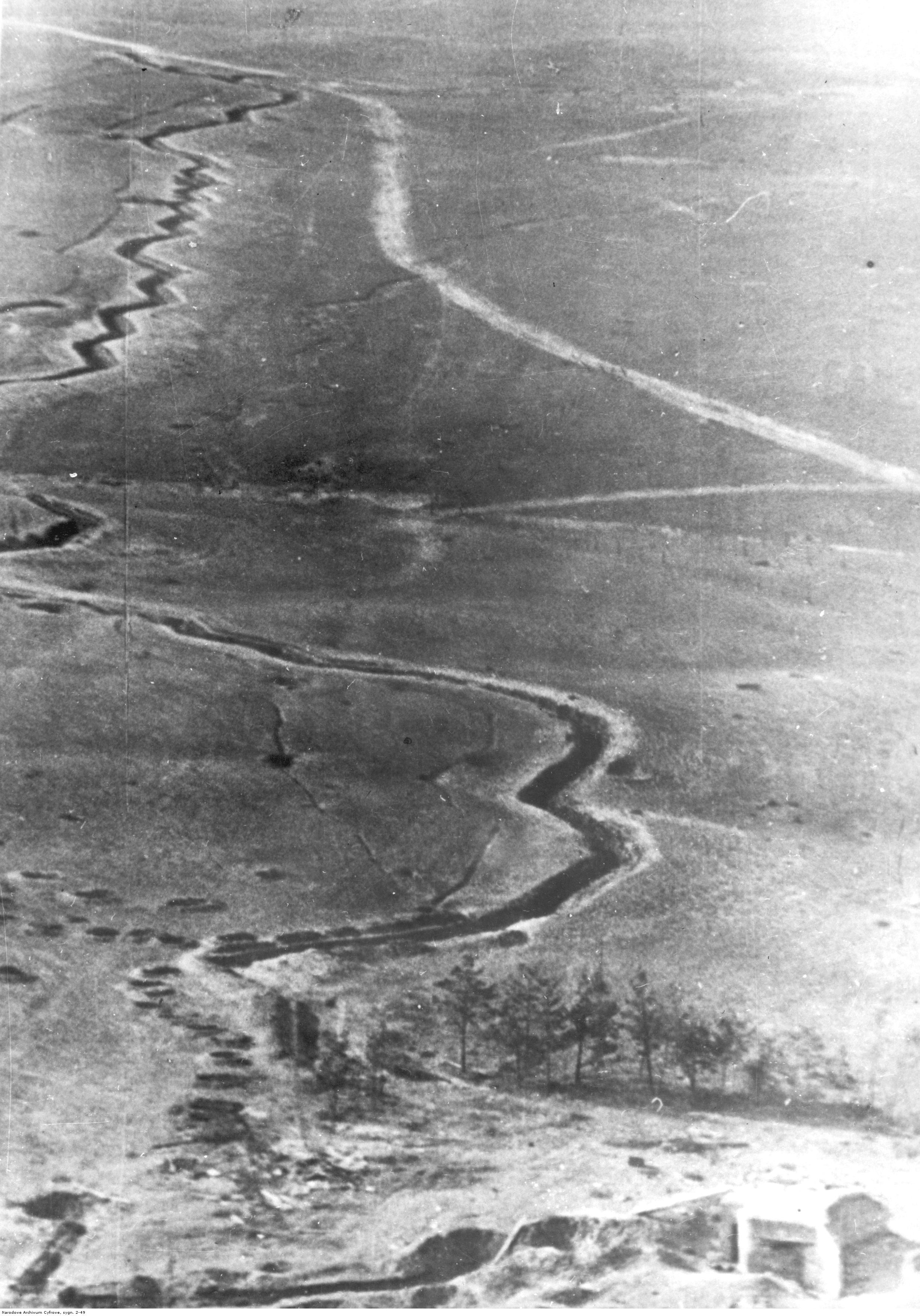 Linia polskich okopów w okolicach Mławy. Fotografia lotnicza.